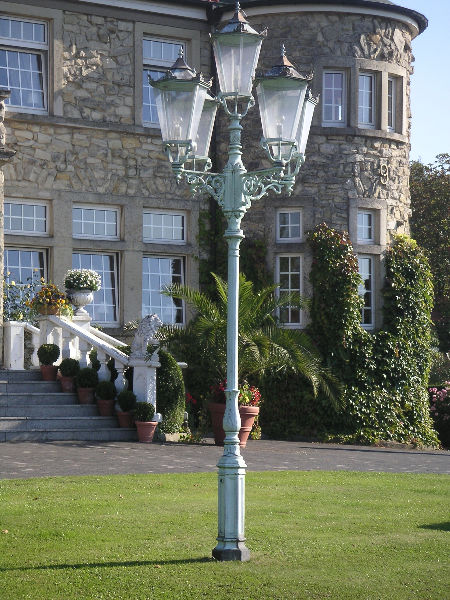 Schinkelleuchte 5-armig